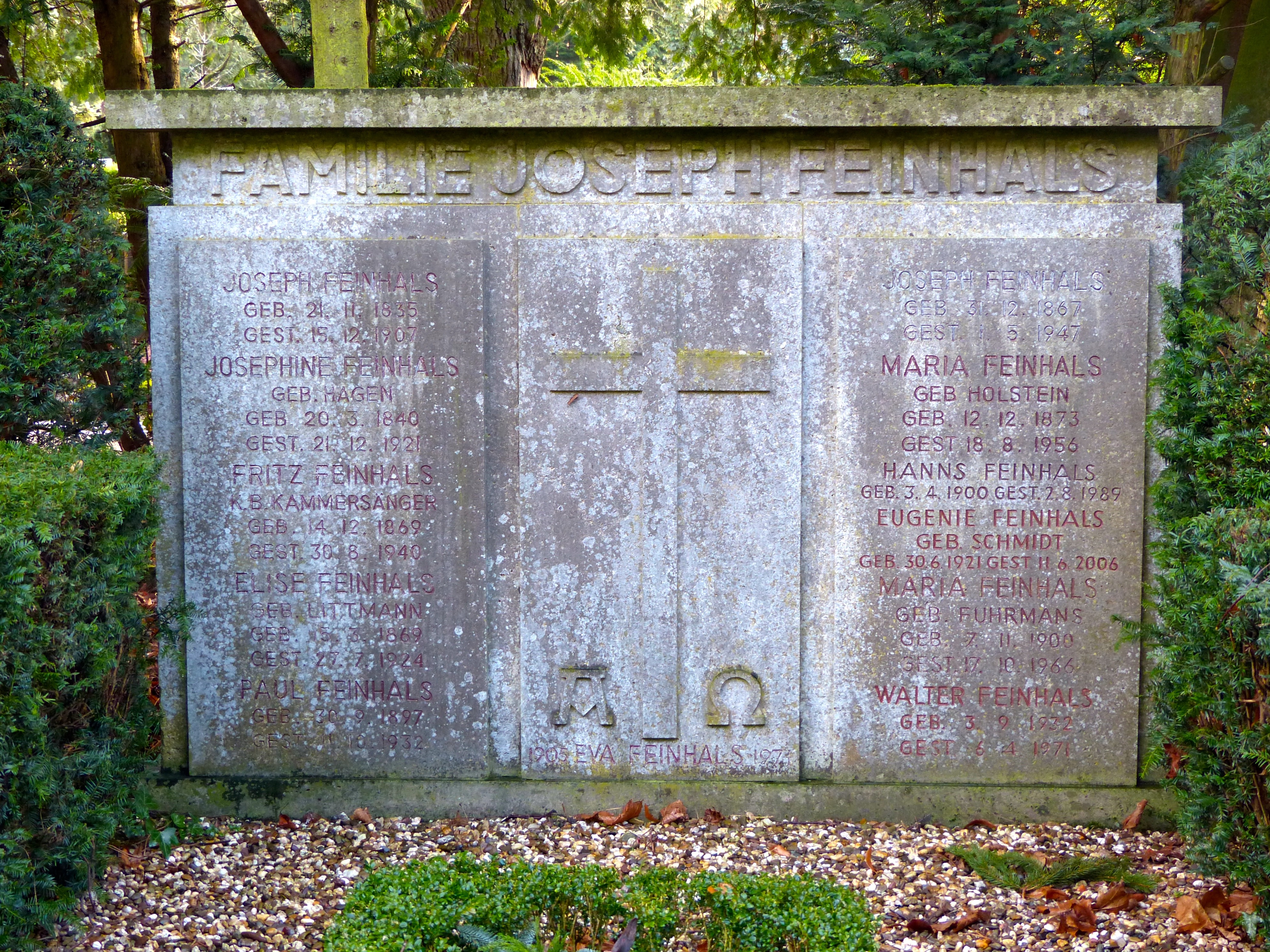 Grabstelle auf dem Melaten-Friedhof: Familengrab Joseph Feinhals